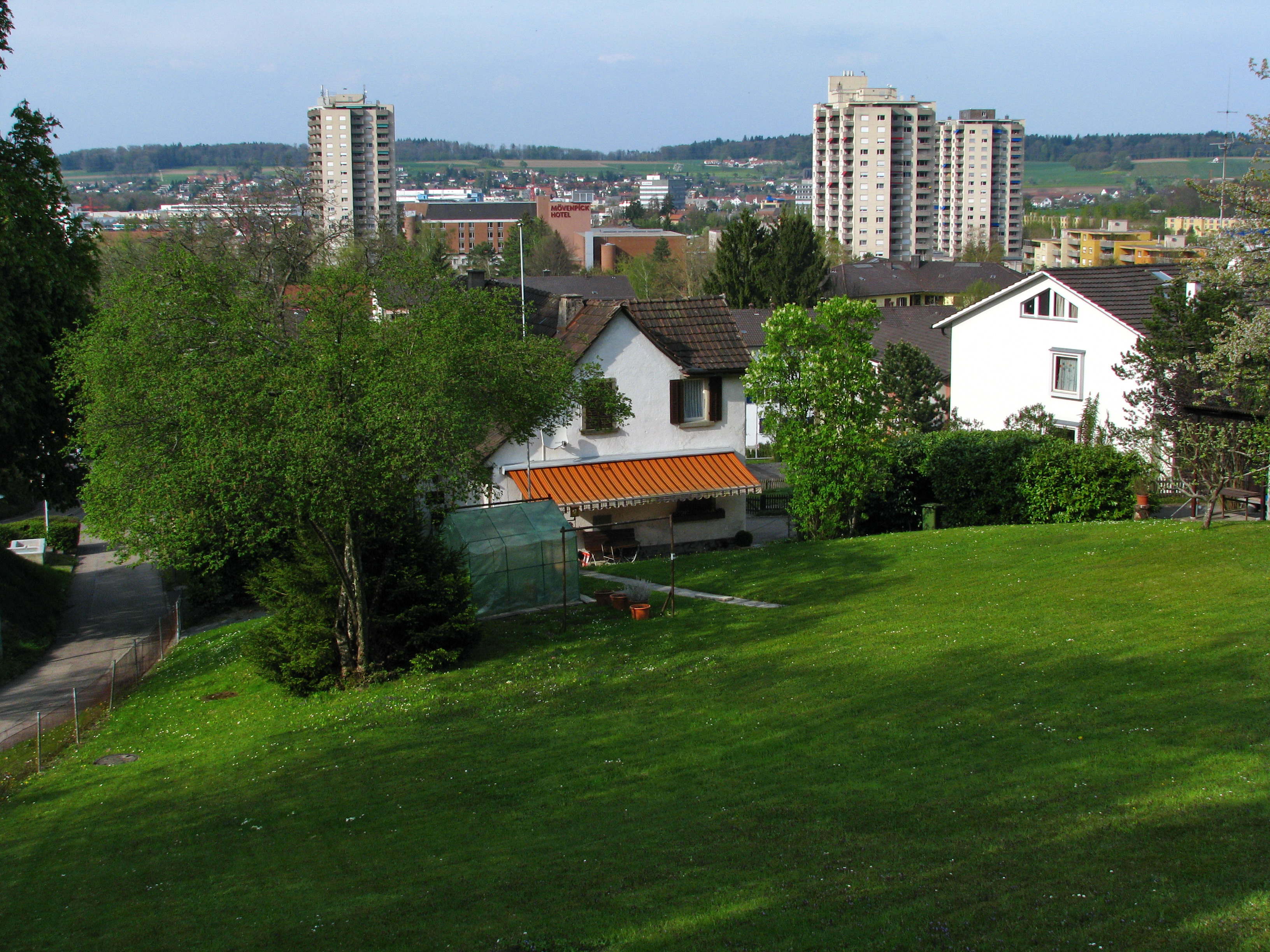 Regensdorf (ZH) as seen from Engstringerweg nearby Gubrist